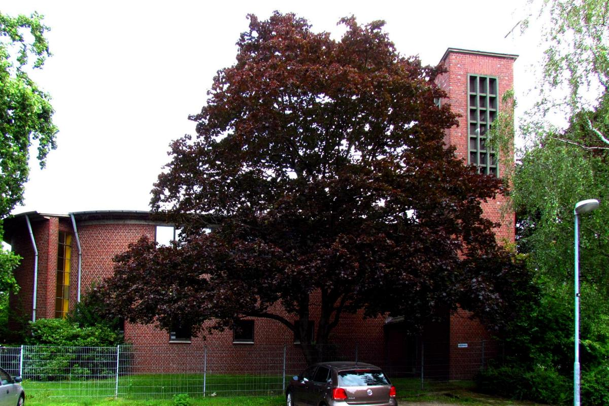 Ev. Kirche Hilfarth